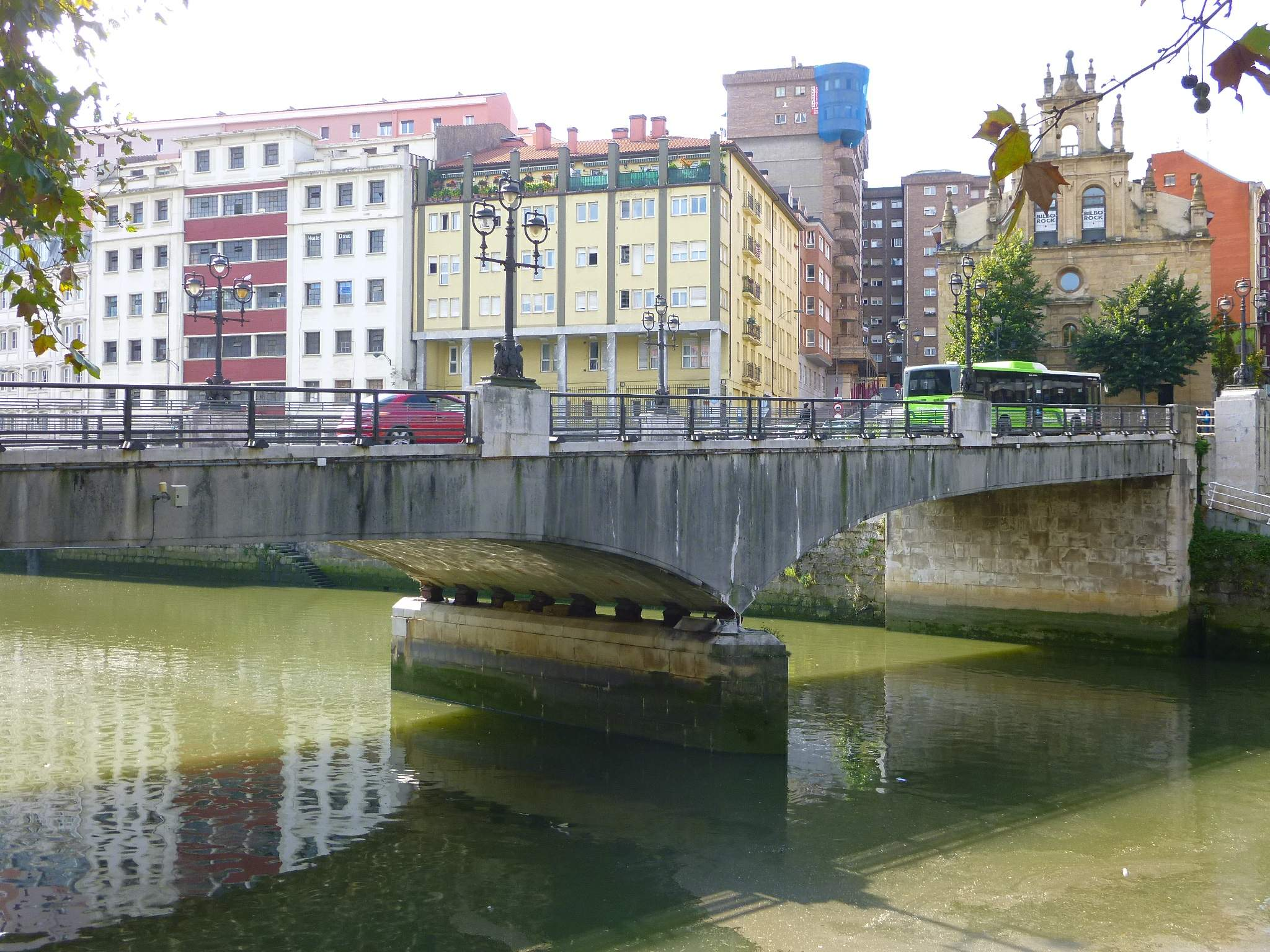 Bilbao - Puente de la Merced